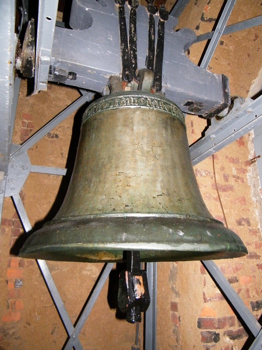 Zvon Maria v kostele svatého Šimona a Judy v Lipové